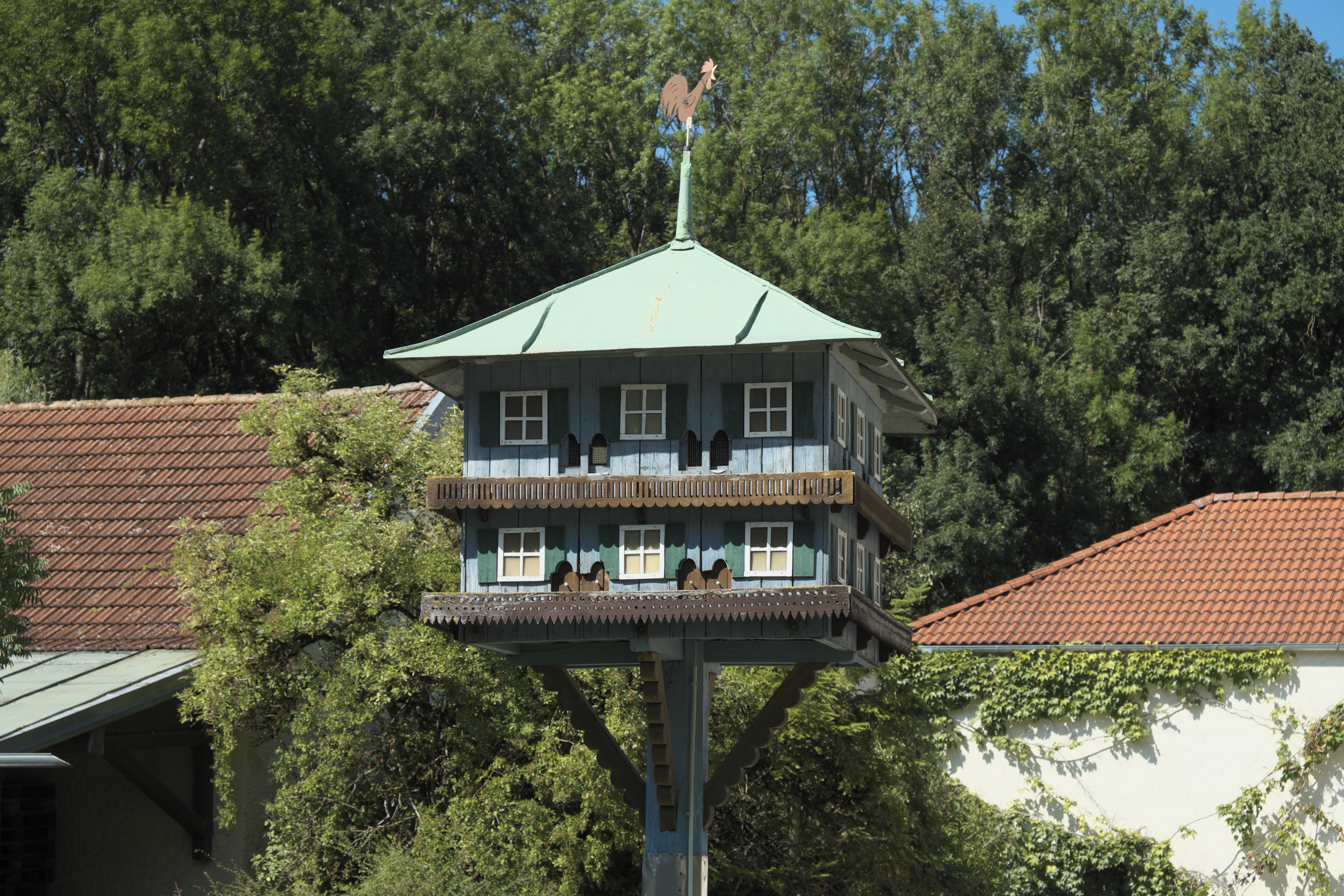 Ehemaliger Wallfahrtsort Mariabrunn in der Gemeinde Röhrmoos im Landkreis Dachau (Bayern/Deutschland), Taubenkobel